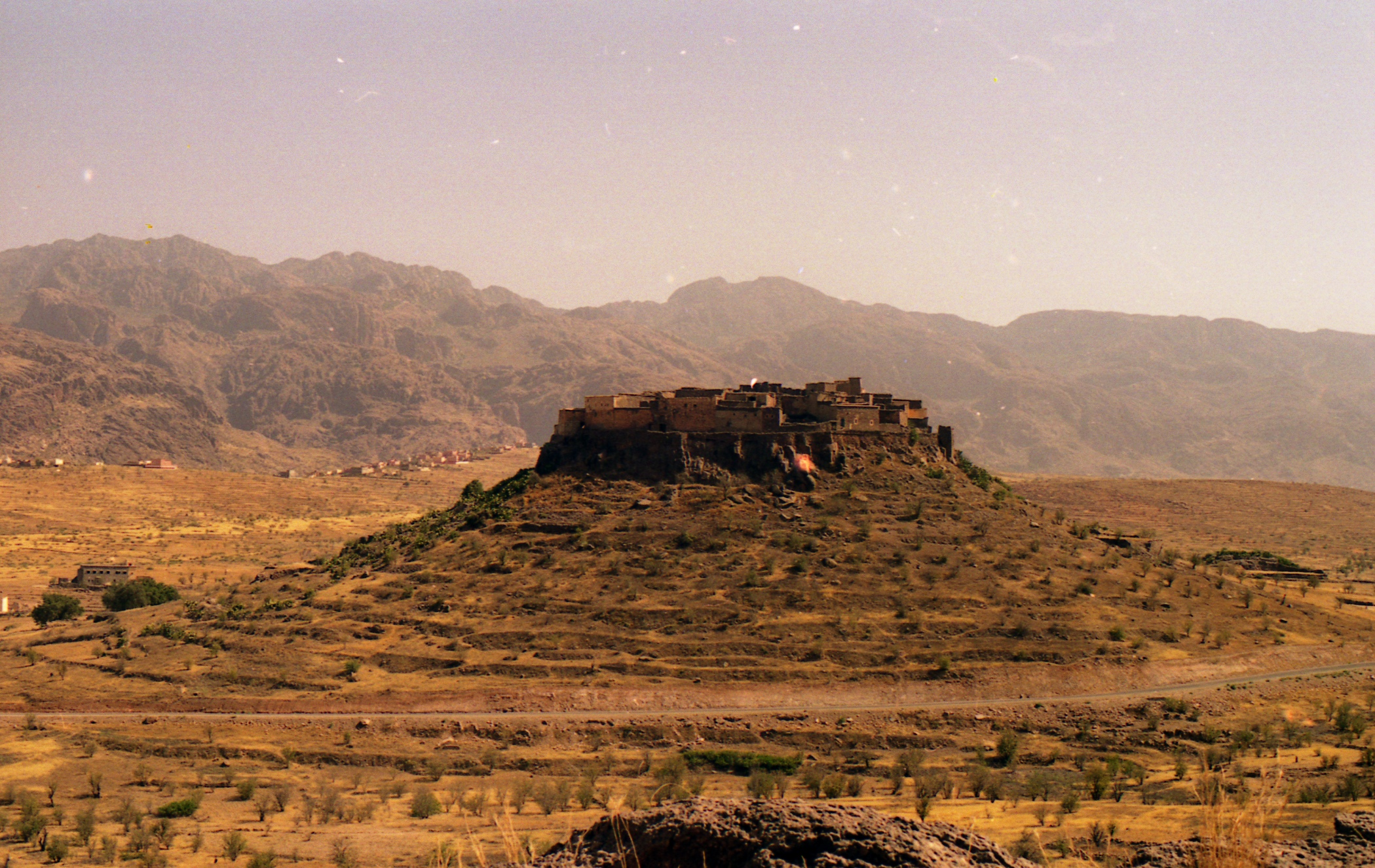 Region-Taroudannt